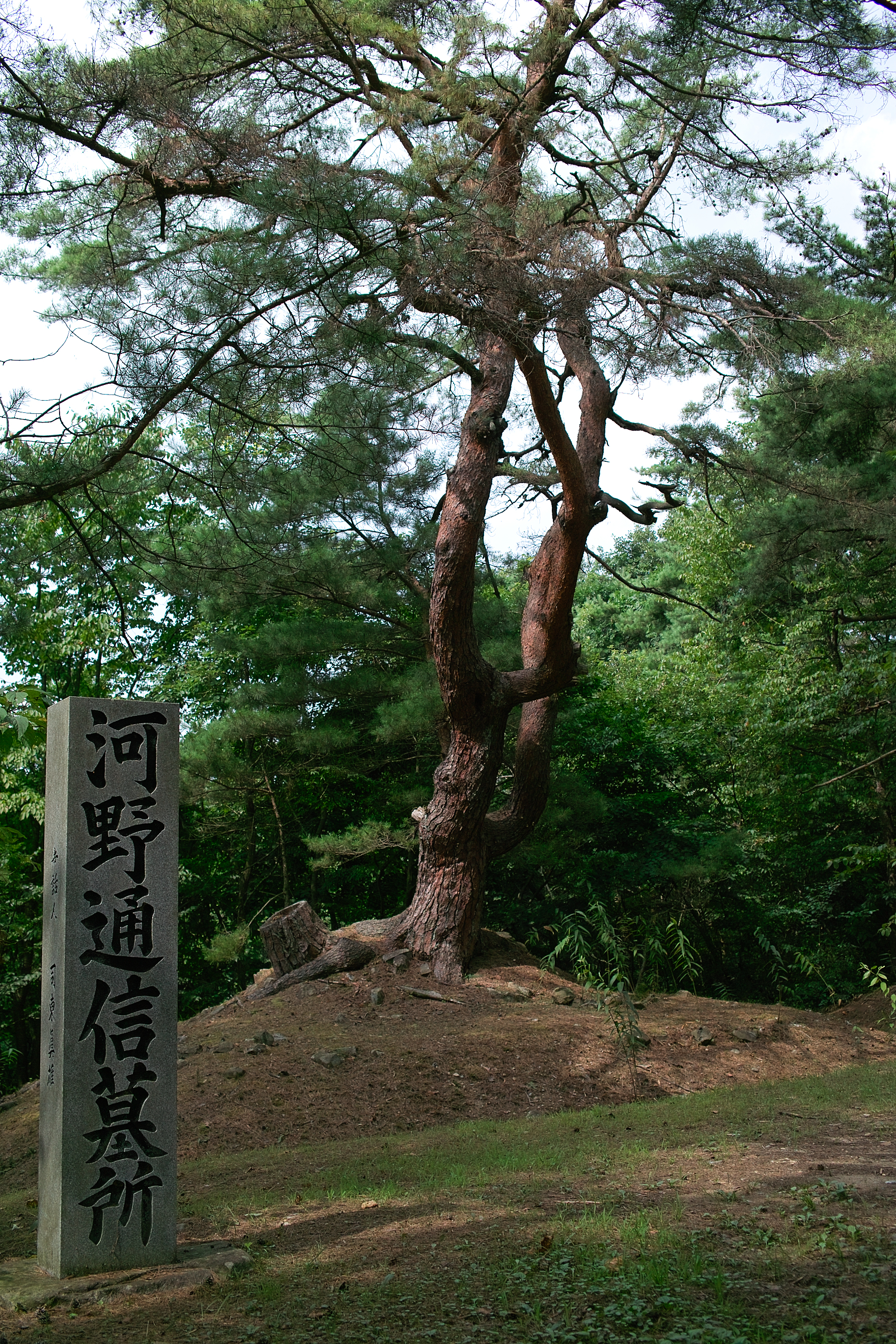 聖塚（河野通信墓所。岩手県北上市）